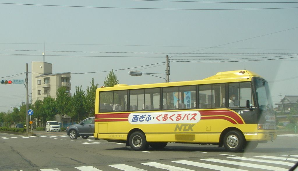 Nishi Gifu_Kurukuru Bus(西ぎふ・くるくるバス),Gifu,Gifu,Japan(岐阜県岐阜市)で撮影